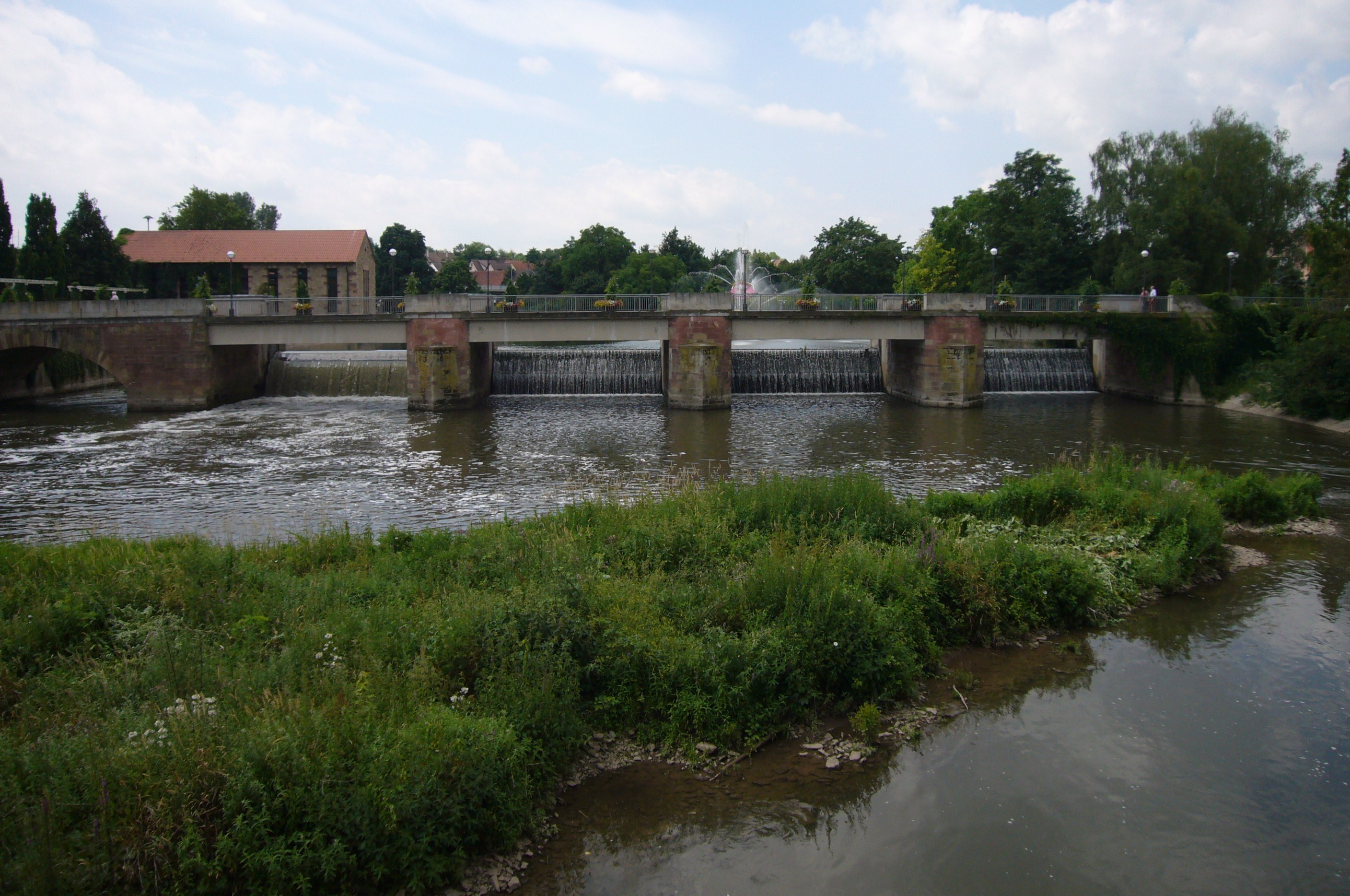 Die Enzbrücke in Bietigheim-Bissingen – Mündung der Metter in die Enz